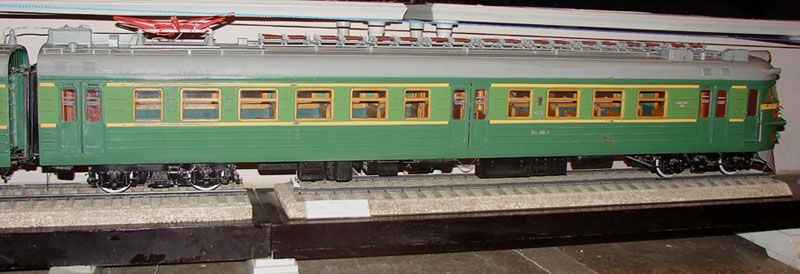 Electric train ER-10 model